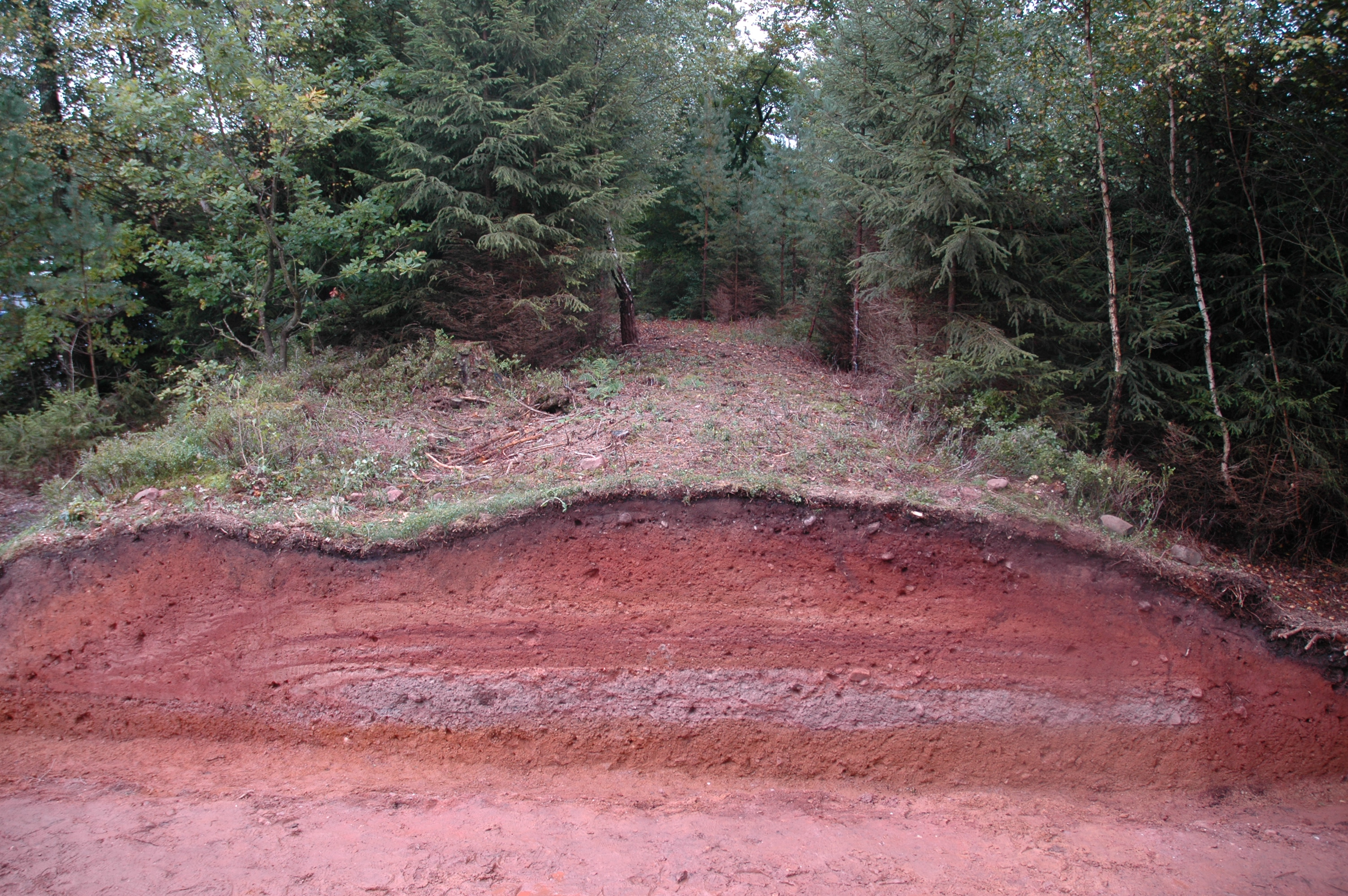 Coupe de chaussée romaine près de Dalhem (Allemagne)